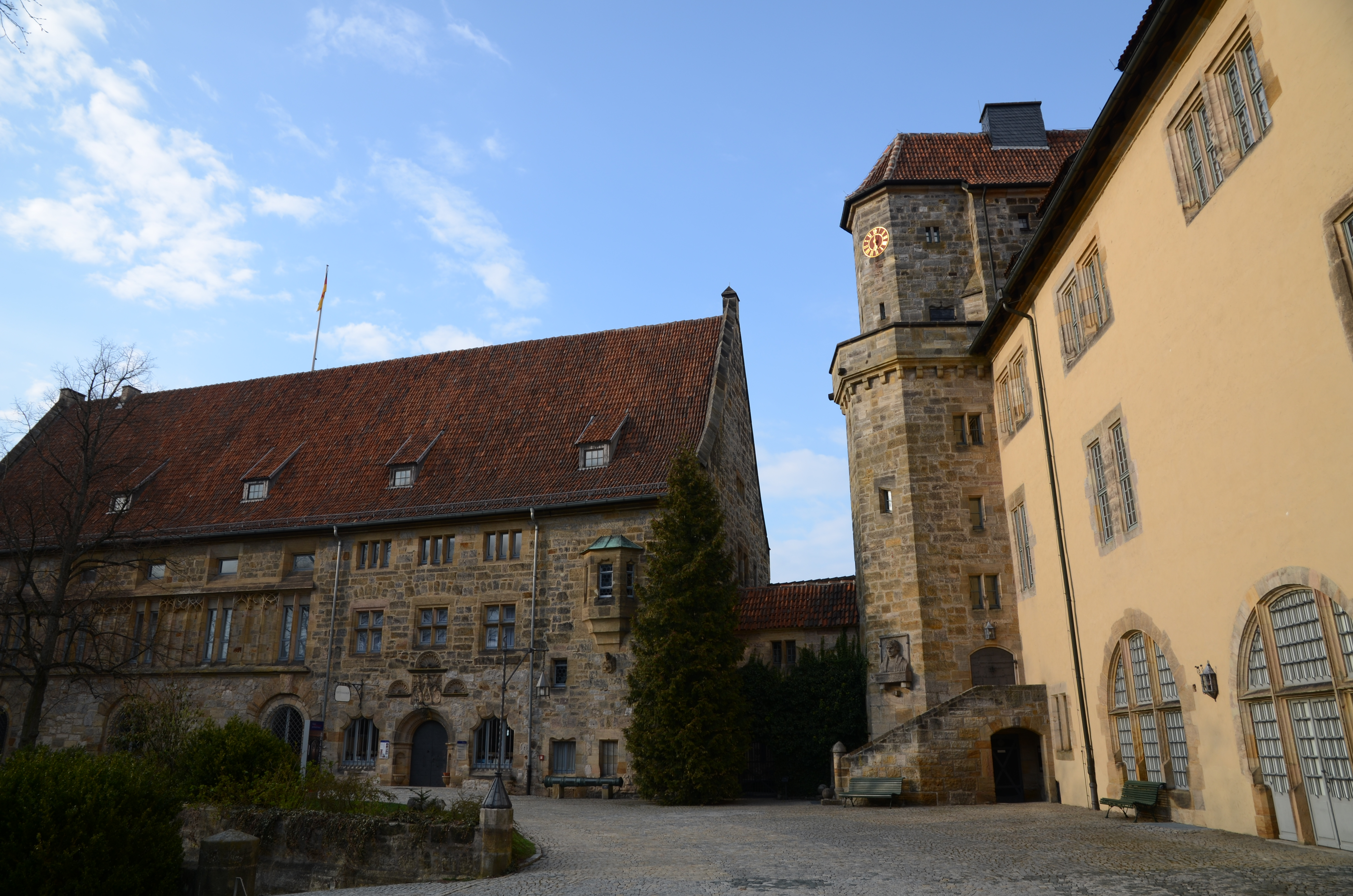 Veste Coburg